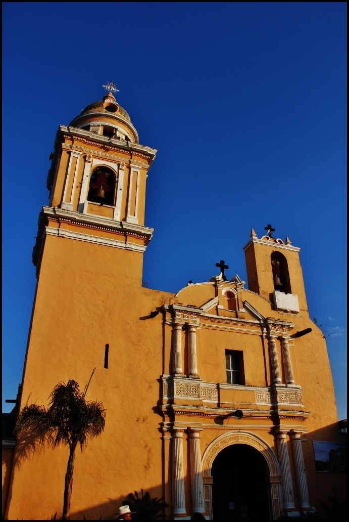 Parroquia de San Buenaventura, Nealtican, Puebla,México.